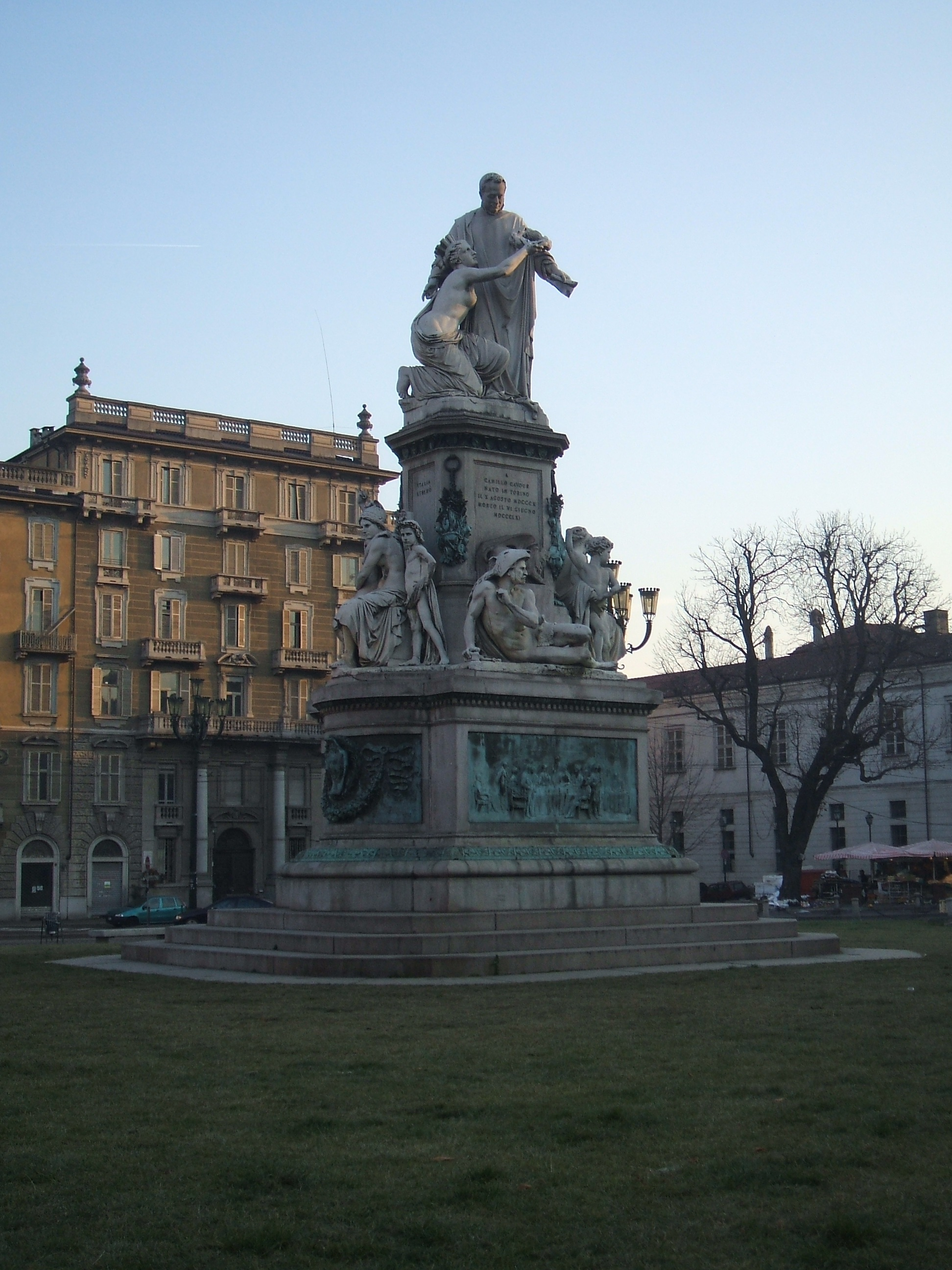 Piazza Carlo Emanuele II, Torino, Monumento a Cavour.